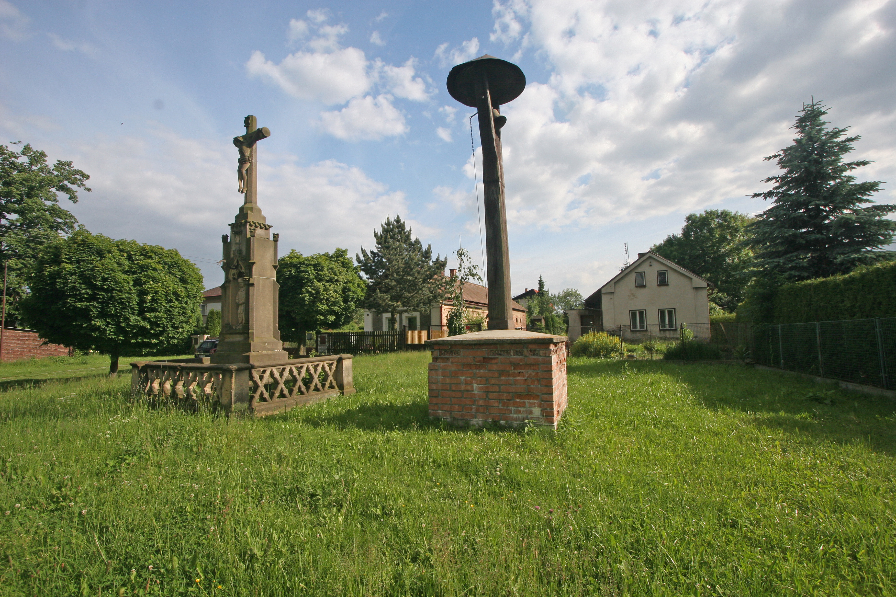 Hubenice křížek a zvonička